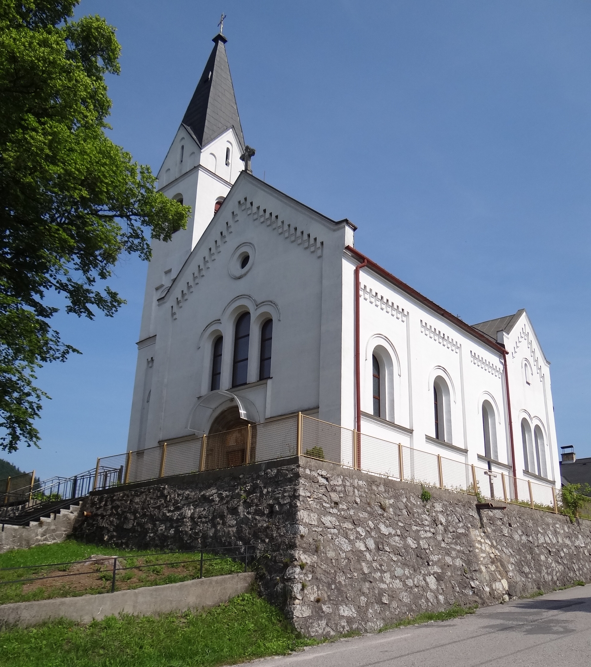 Valaská Dubová